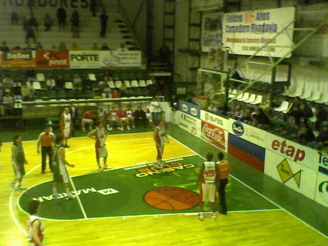 Última anotación con la que Gimnasia logró el triunfo ante Independiente de Neuquén en 5 de octubre de 2008 en el estadio "Socios Fundadores"